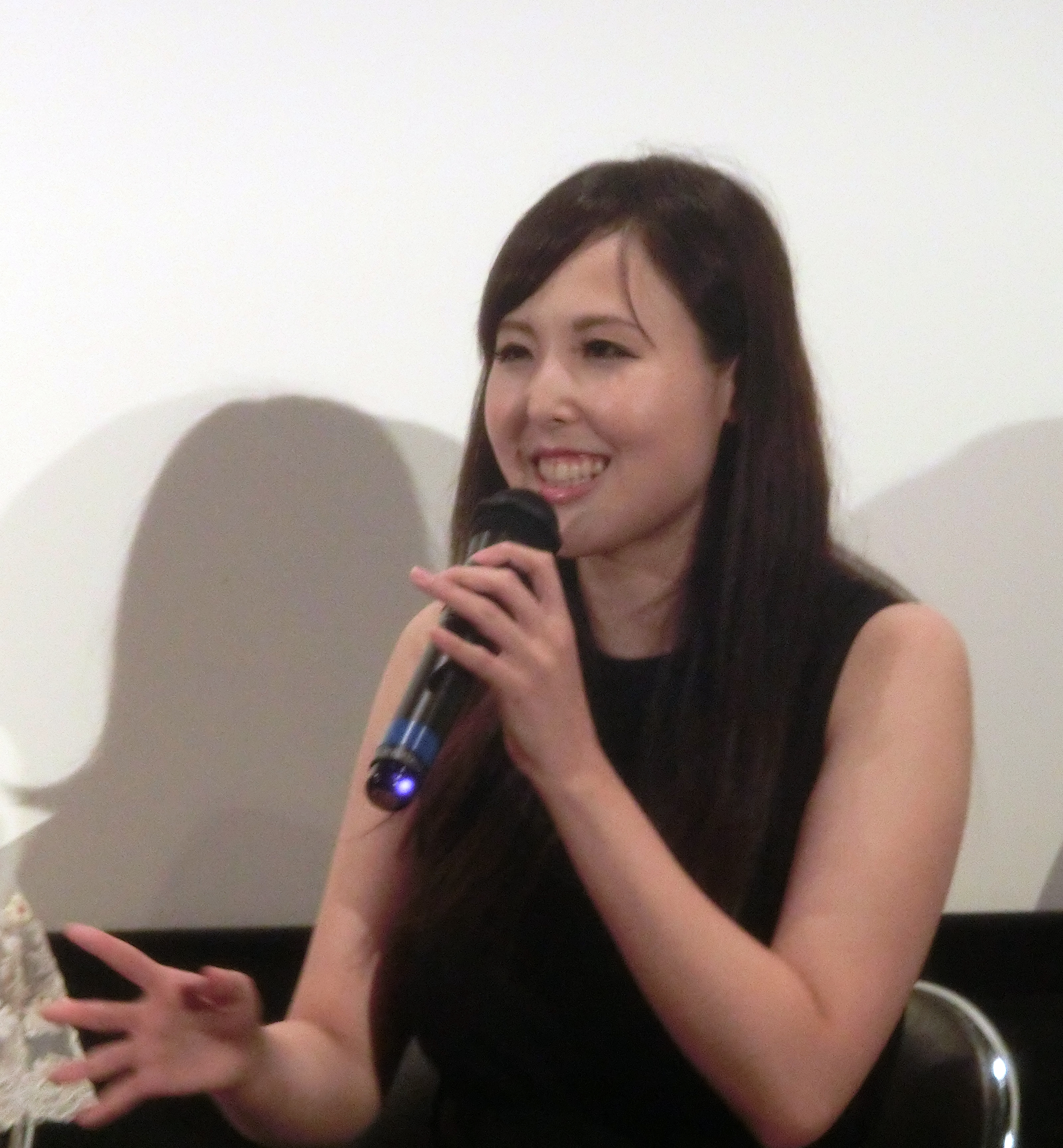 上野オークラ劇場2019年8月10日舞台挨拶